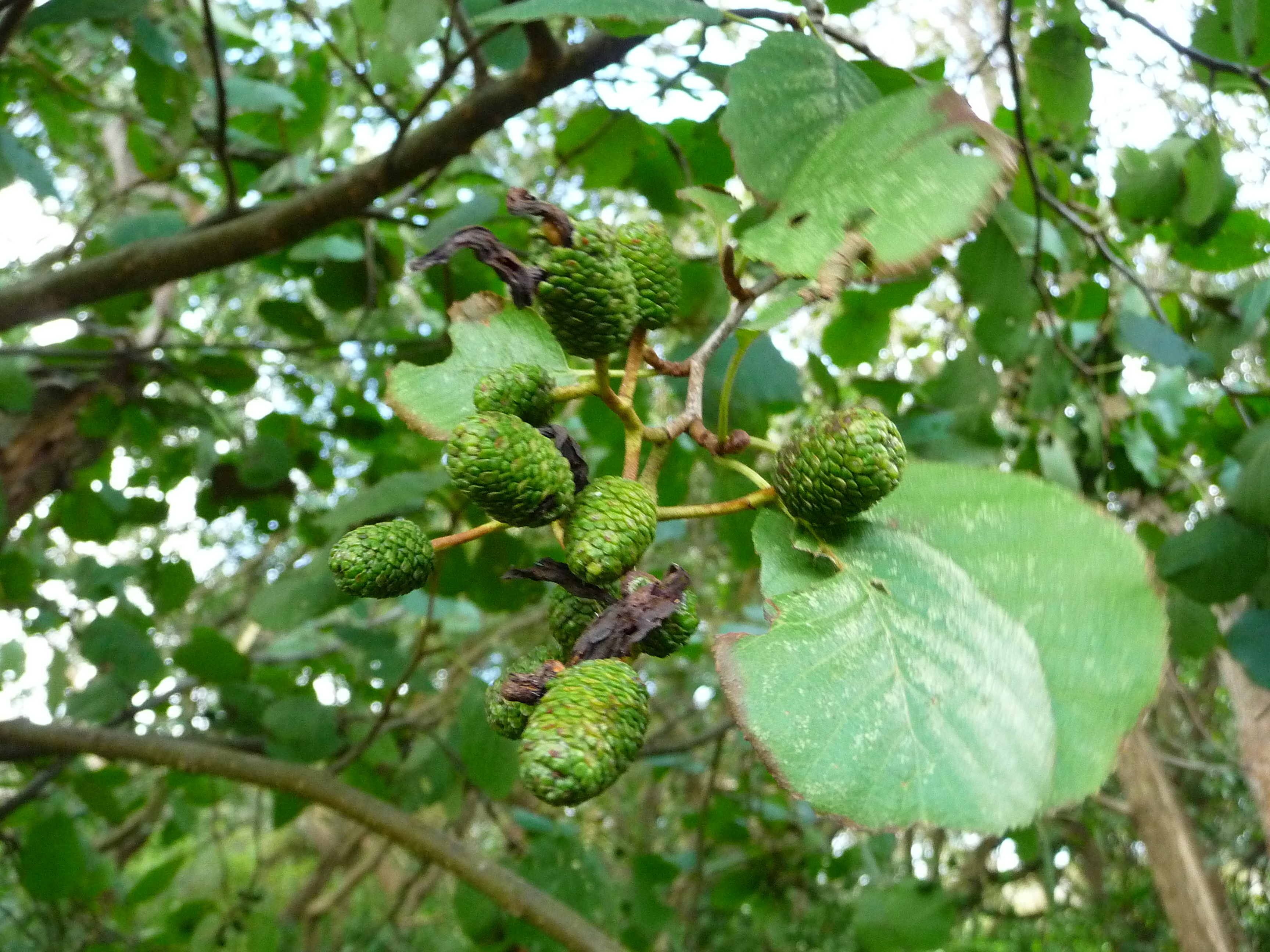 Unreife Fruchtstände der Schwarzerle (Alnus glutinosa), aufgenommen auf der ostfriesischen Nordseeinsel Juist (Niedersachsen, Deutschland)